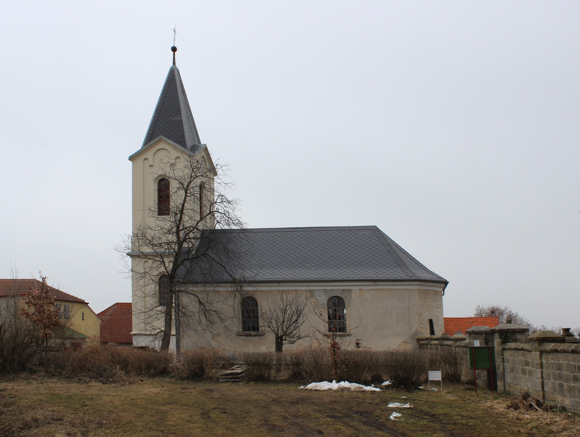 Evangelický kostel (Českobratrské církve evangelické) v Kovanci.